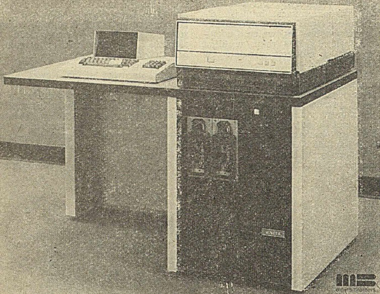 System 1500 Singer Business Machines